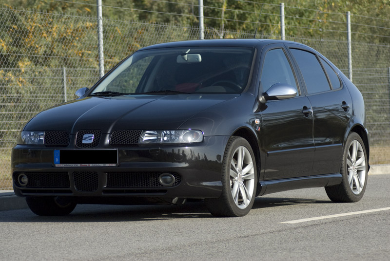 Seat Leon 1M Modelljahr 2004 TDI (Pumpe-Düse) 110 kW / 150 PS